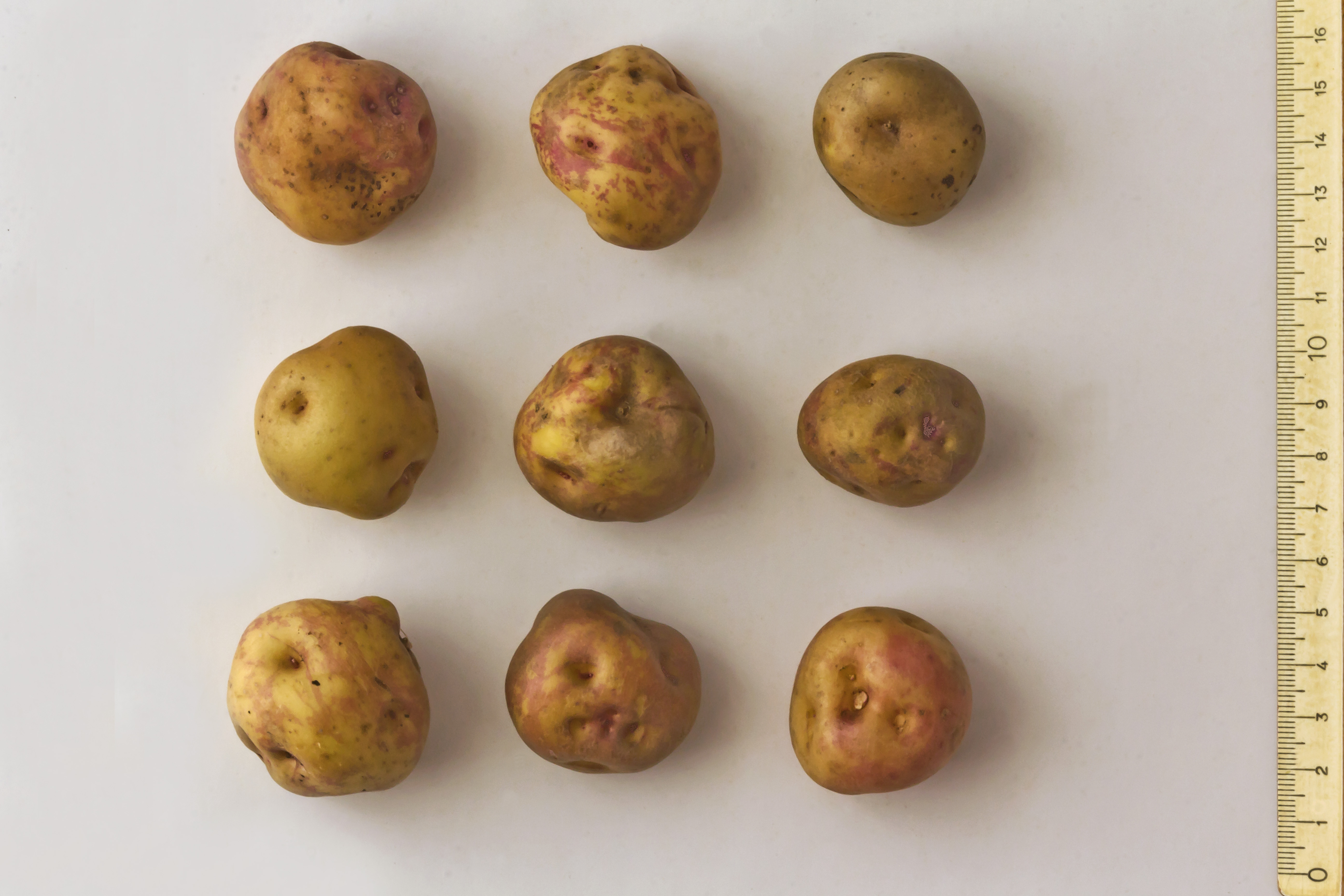 Papas Antiguas de Canarias, papas bonitas